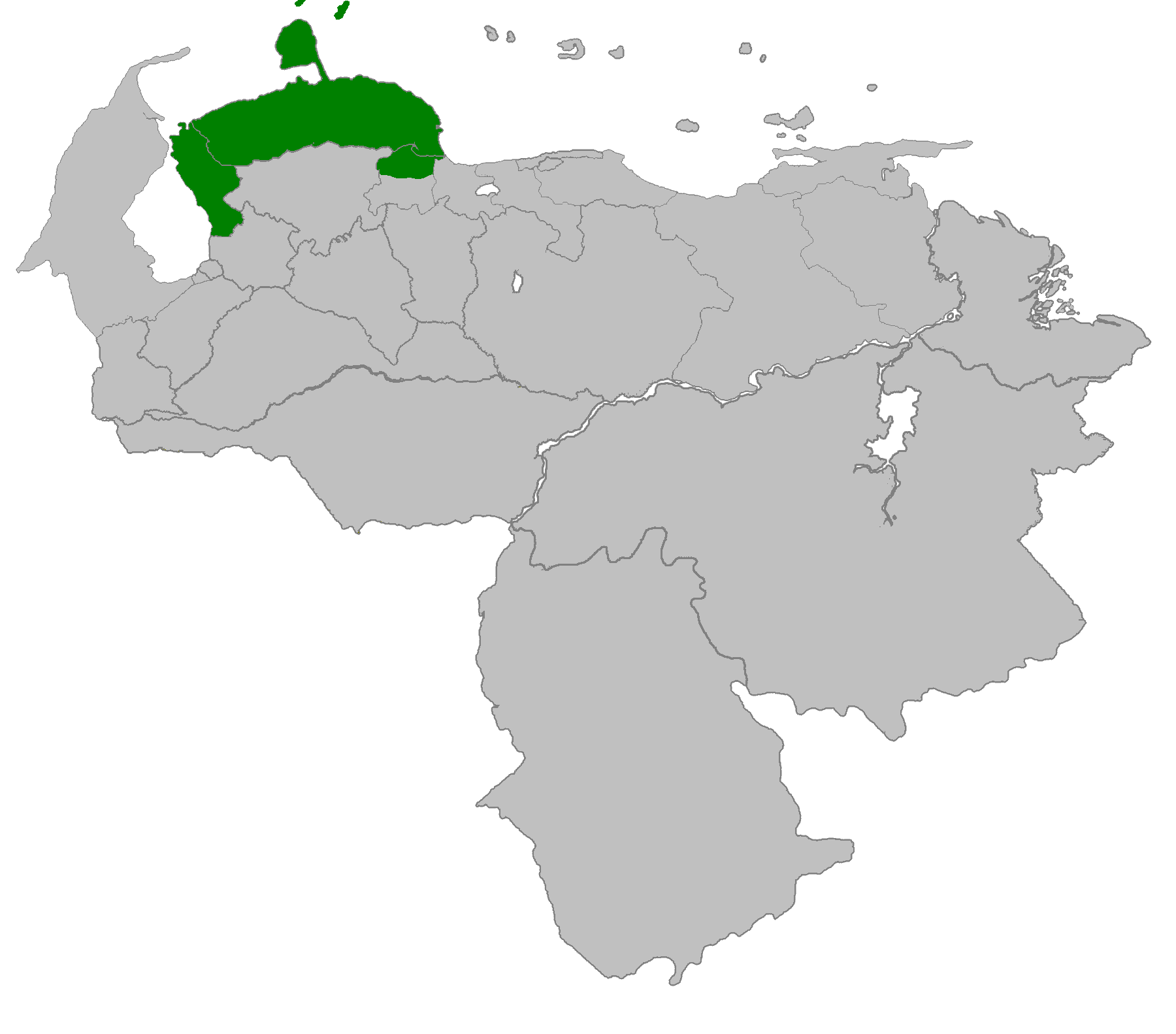 Nación de los caquetíos bajo el Cacique Manaure